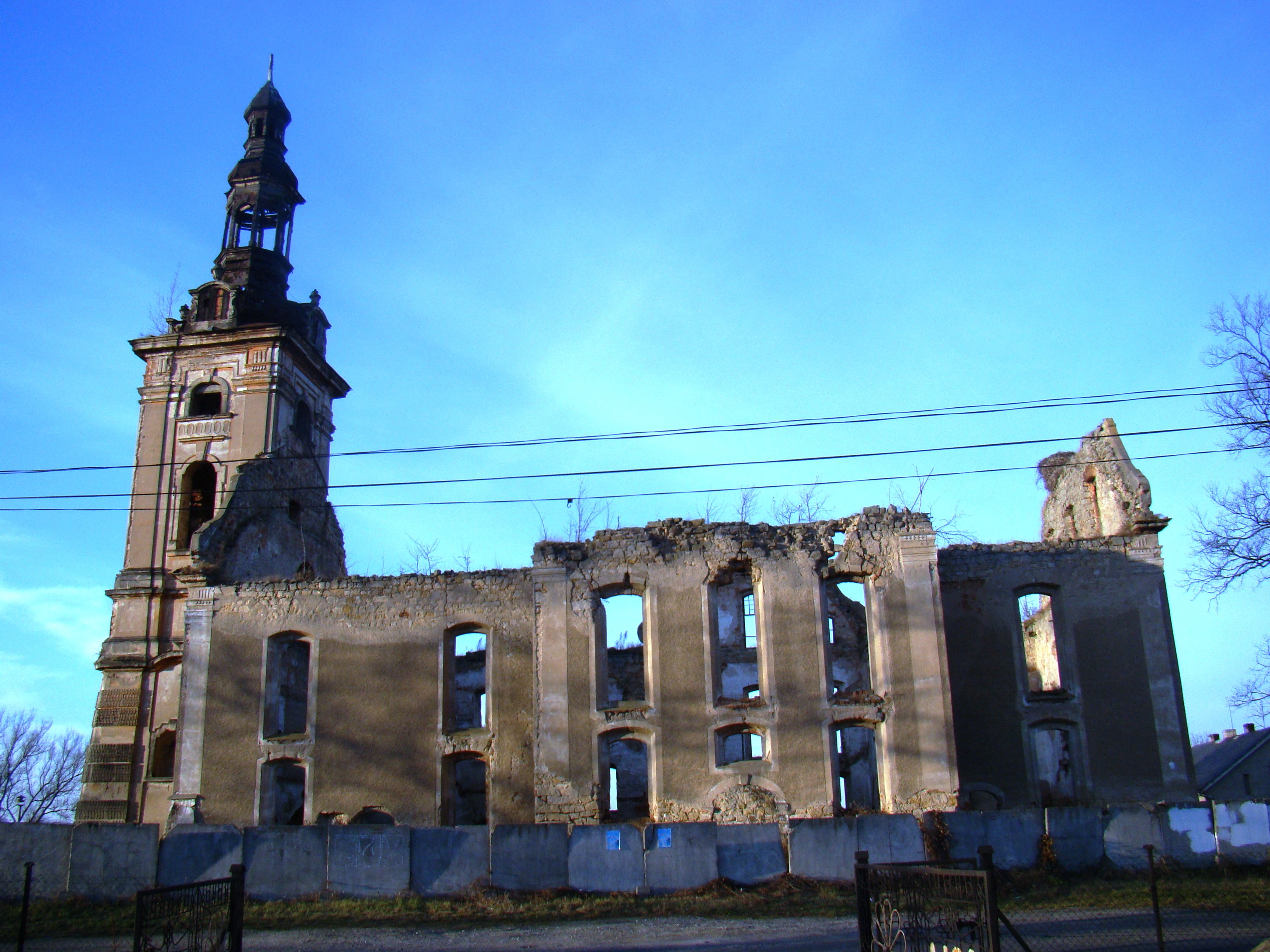 Twardocice - wieża kościoła ewangelickiego „Granicznego”, XVII-XVIII, z kaplicą grobową Holzbergów, 1726